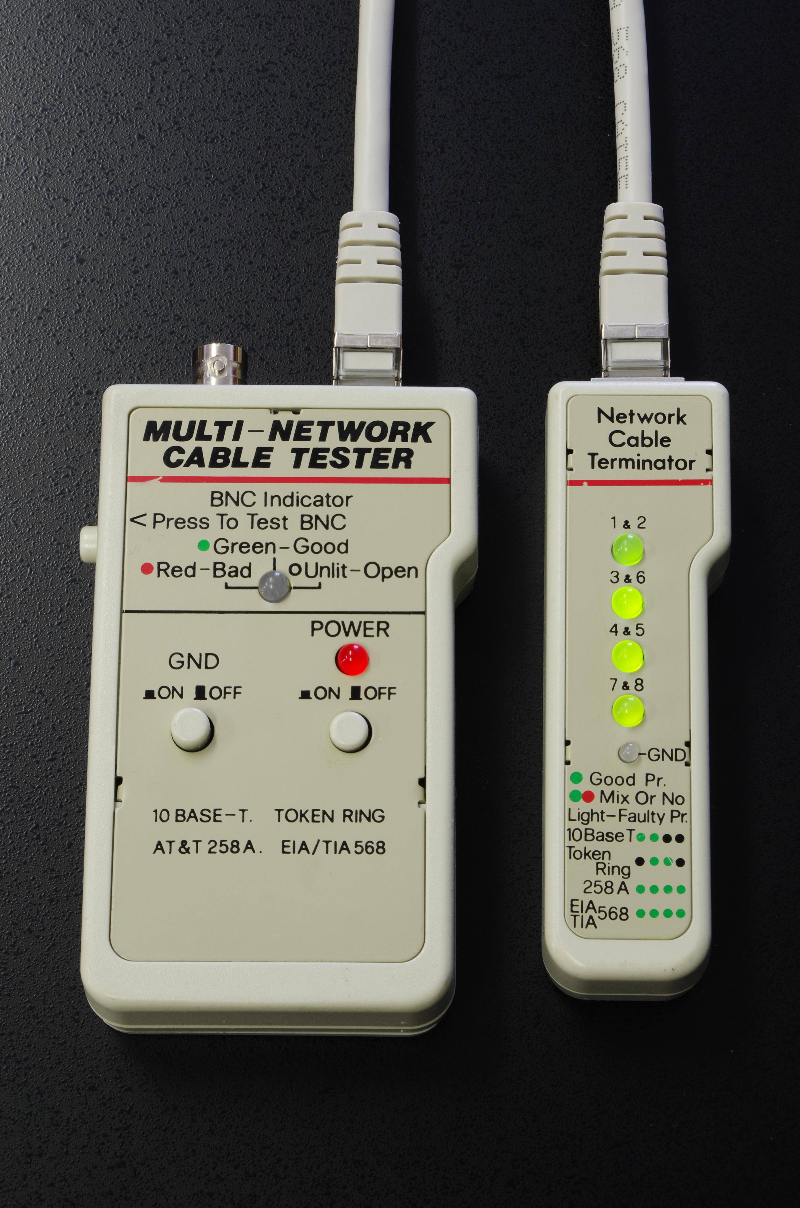 Kabeltester für RJ45 und BNC-Netzwerkverkabelungen. Kann Anschlußvertauschungen, Kurzschlüsse gegen Masse und gegen Leiter erkennen sowie Unterbrechungen. Keine Impedanzmessungen, Übersprechen, Dämpfung, Laufzeitmessungen o.ä. Im Prinzip ein komfort-Durchgangstester.